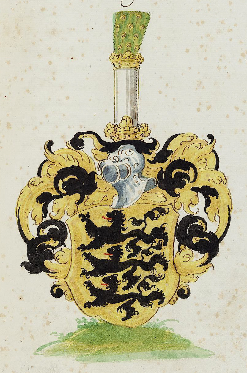 Wappen aus: David Wolleber: Chorographia Württemberg, [Schorndorf] 1591, Universitätsbibliothek Tübingen, Mh 6,1 Wappen der Freiherren von Hohenstaufen (Staufer)